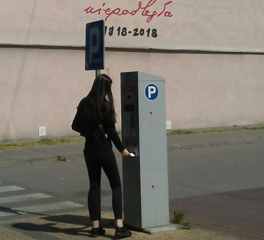 Dziewczyna korzystająca z parkometru z panelem fotowoltaicznym w Tomaszowie Mazowieckim